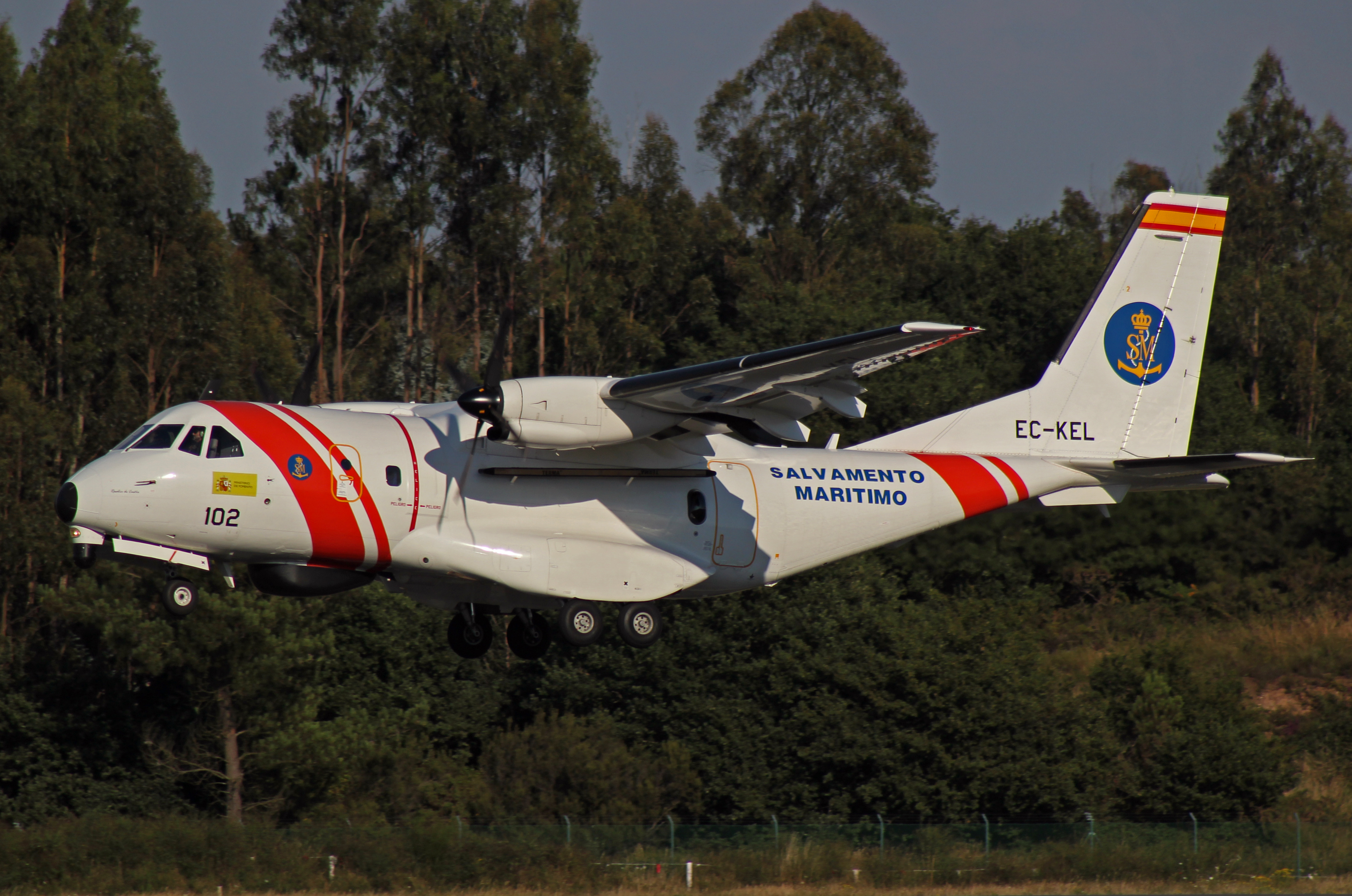 CASA CN-235 de Salvamento Marítimo no aeroporto de Santiago de Compostela.